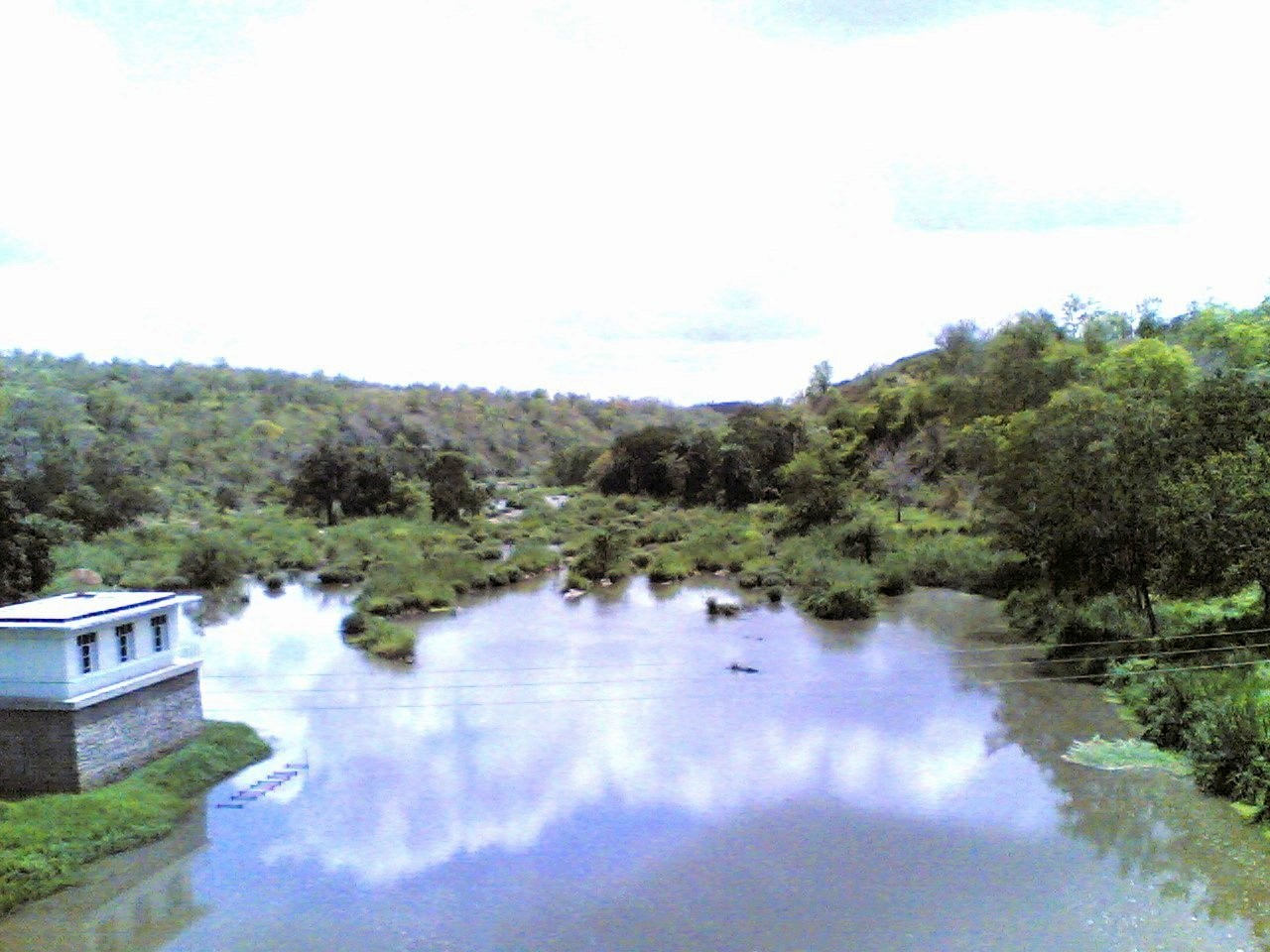 Wami River in Tanzania.